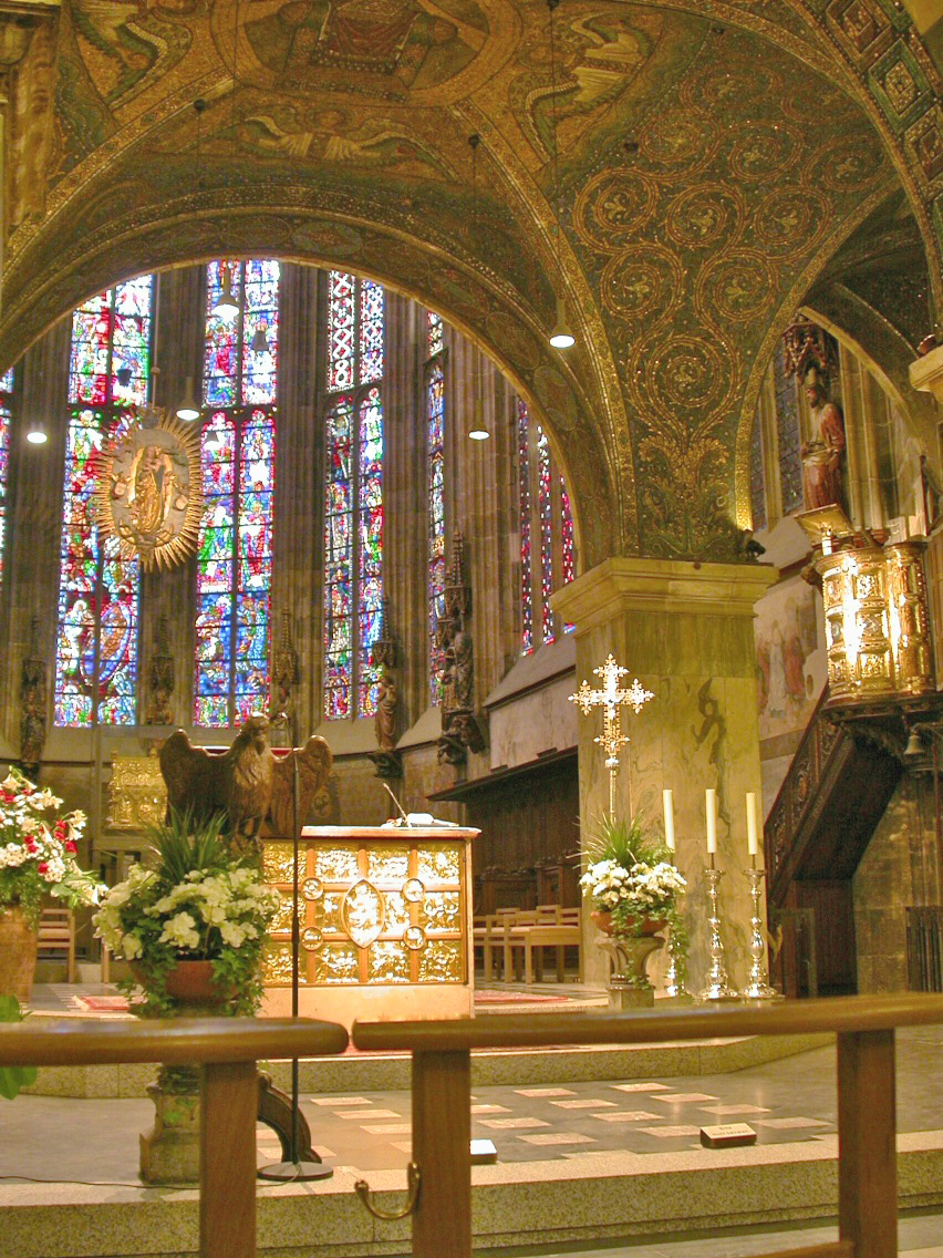 Doum Oochen Altorraum